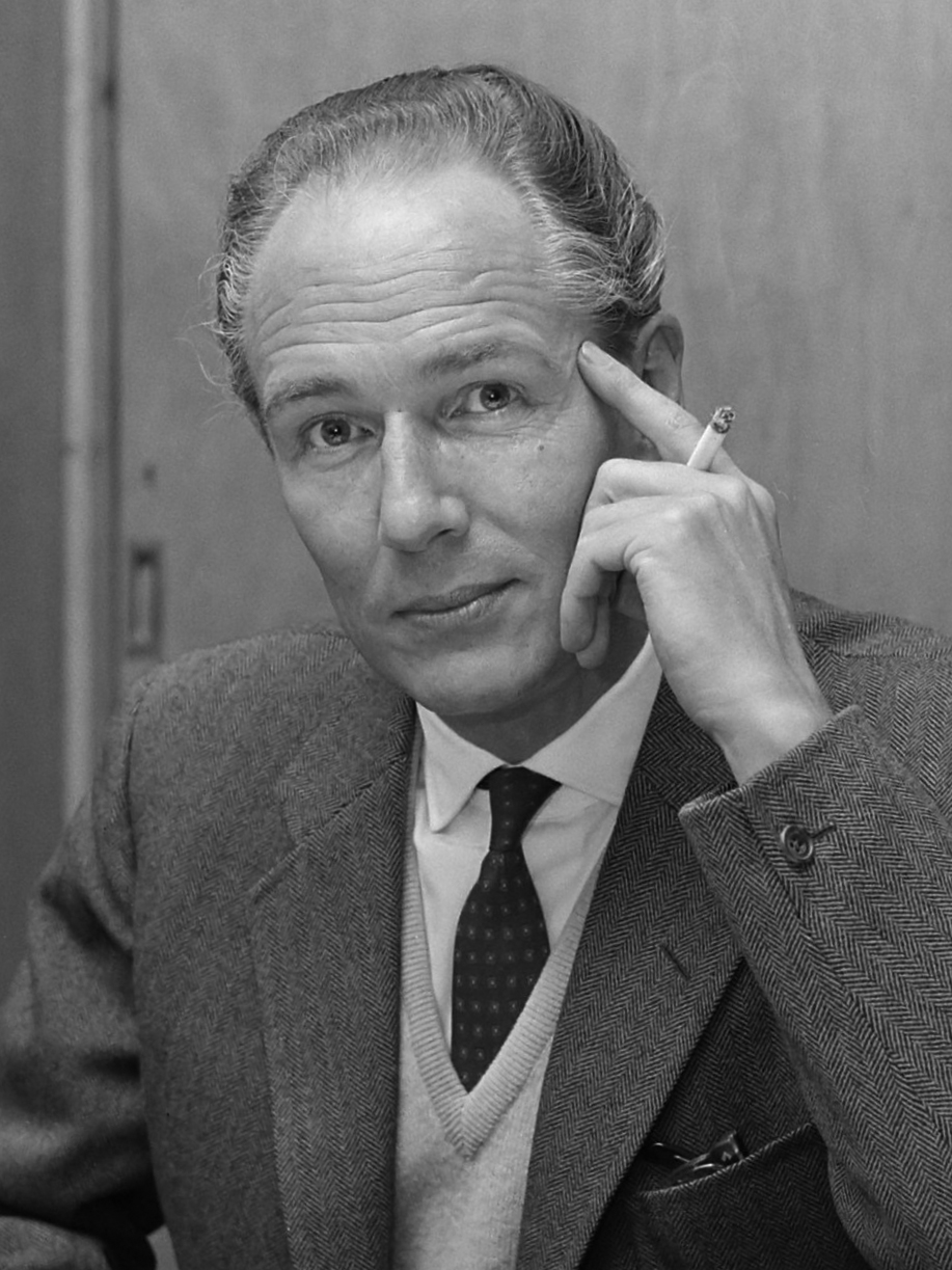 Opdracht Telegraaf, Guus Oster (kop) 4 oktober 1965